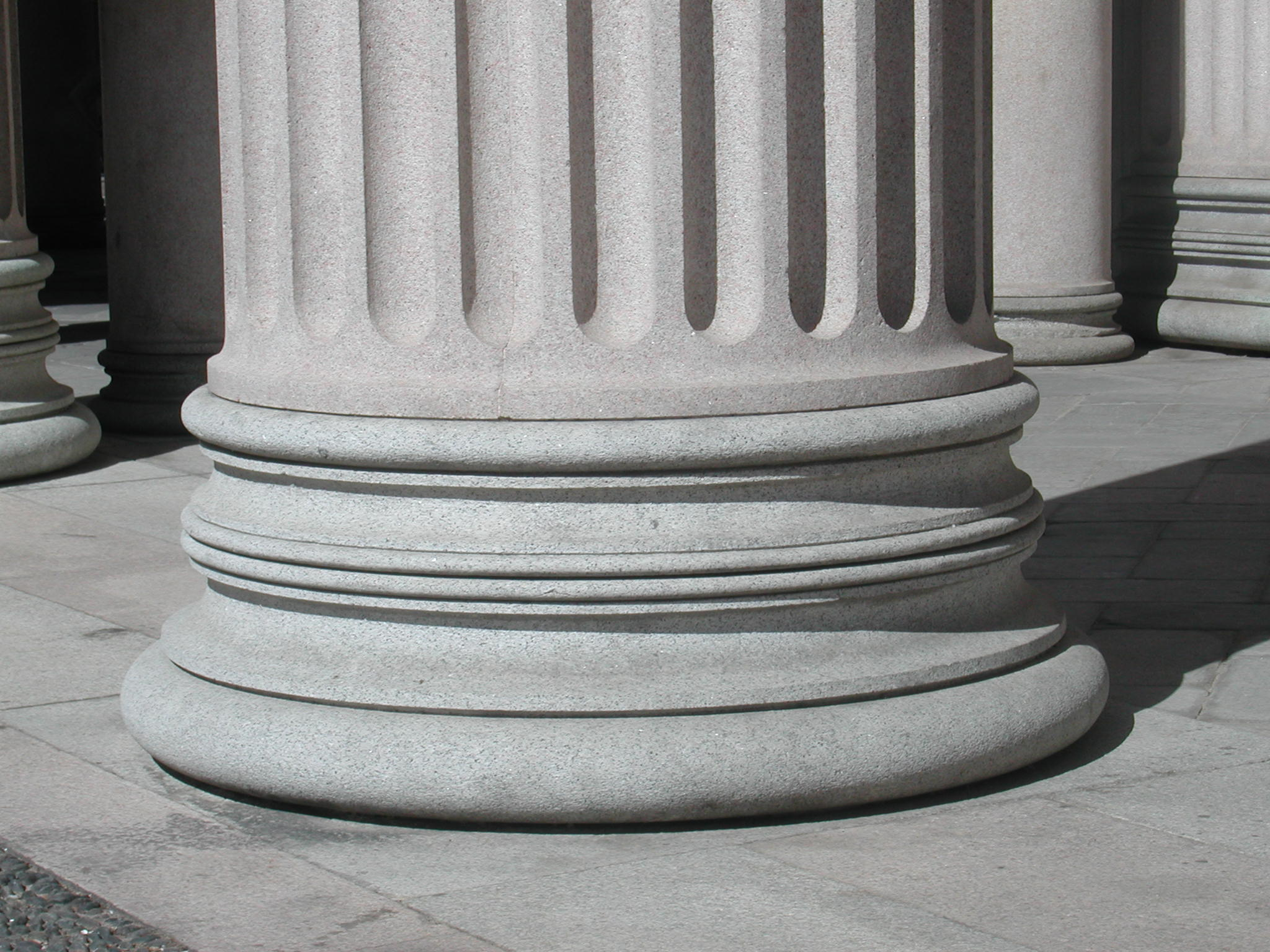 Novara, Italy, duomo, detail column